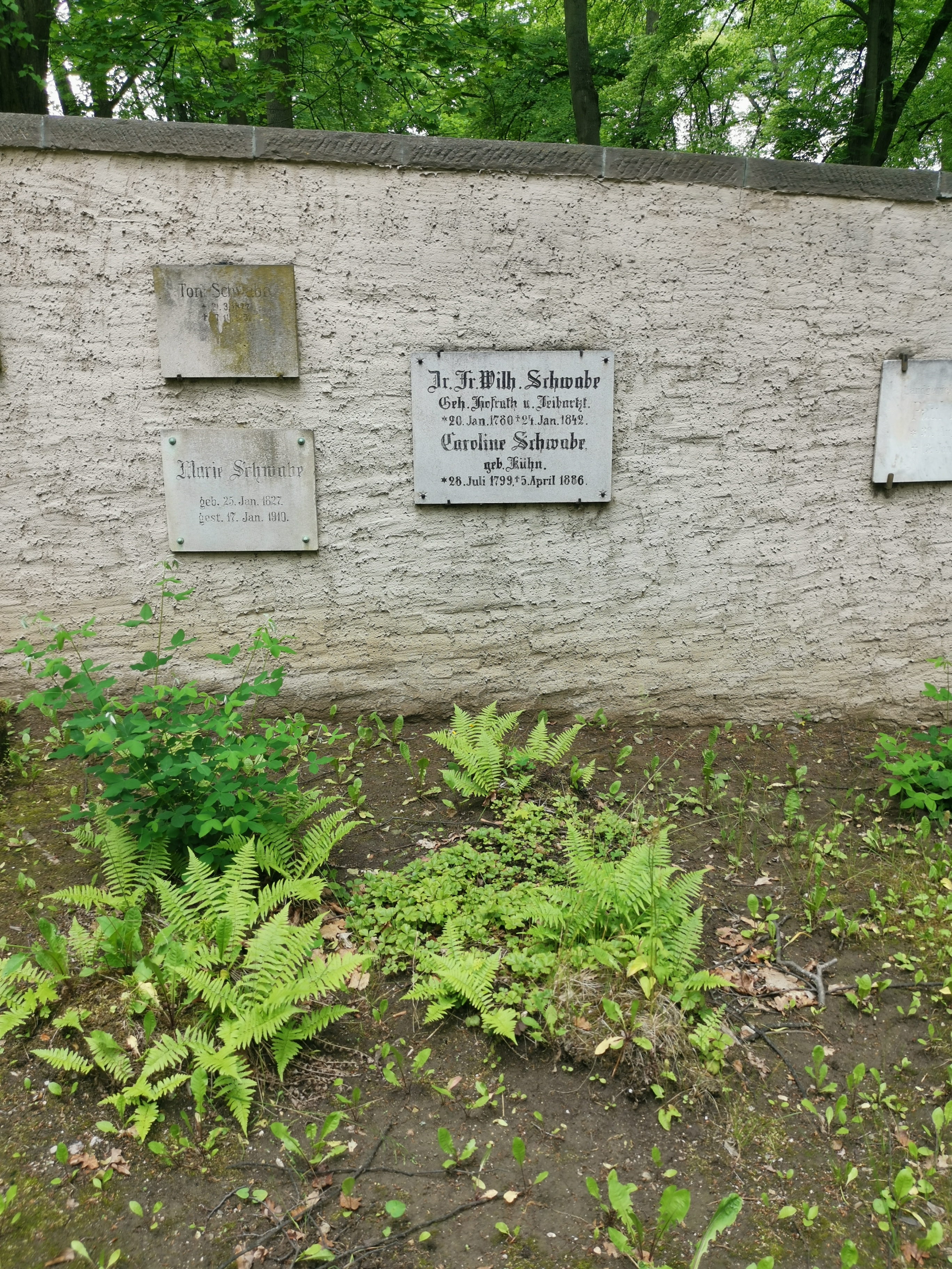 Grabstätte Friedrich Wilhelm Schwabe; Historischer Friedhof Weimar